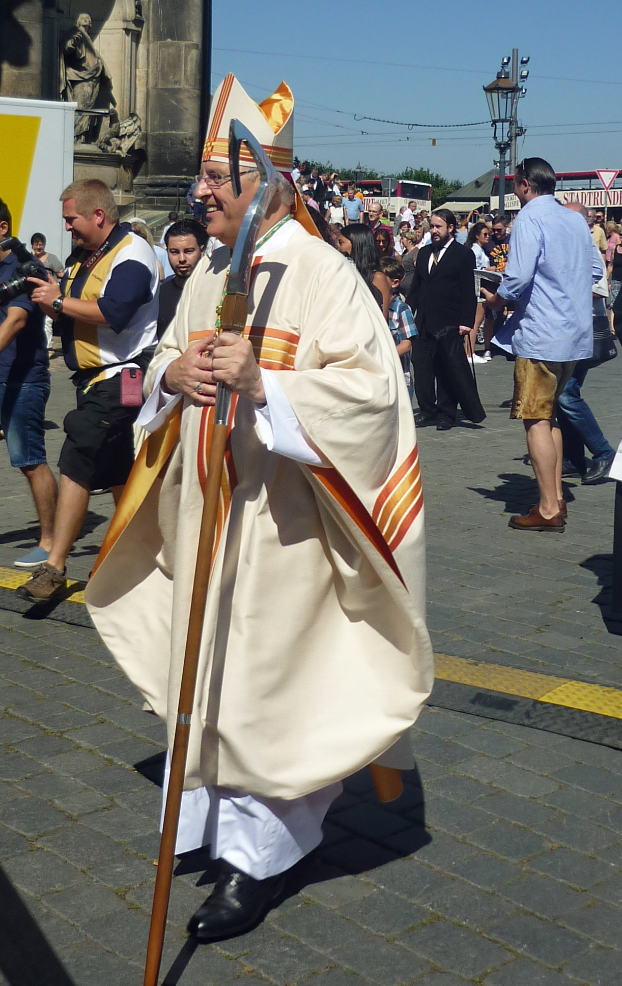 Amtseinführung des neuen Bischofs Heinrich Timmerevers am 27. August 2016 in der Kathedrale des Bistums Dresden-Meißen: Bischof Heinrich Timmerevers mit dem Bischofsstab des Hl. Benno (für die Zeremonie aus München überlassen)